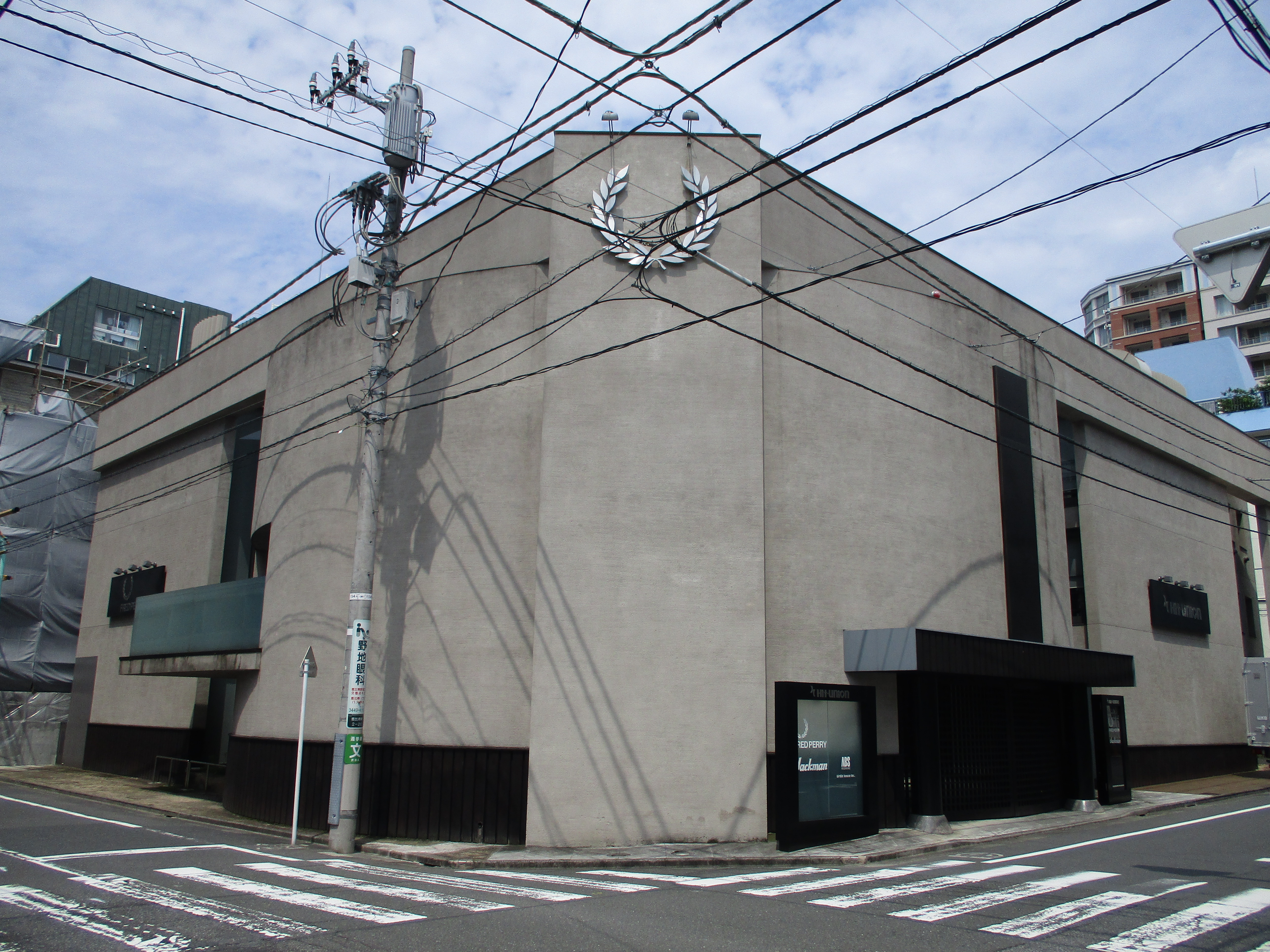 2016/5/29、作者本人による撮影